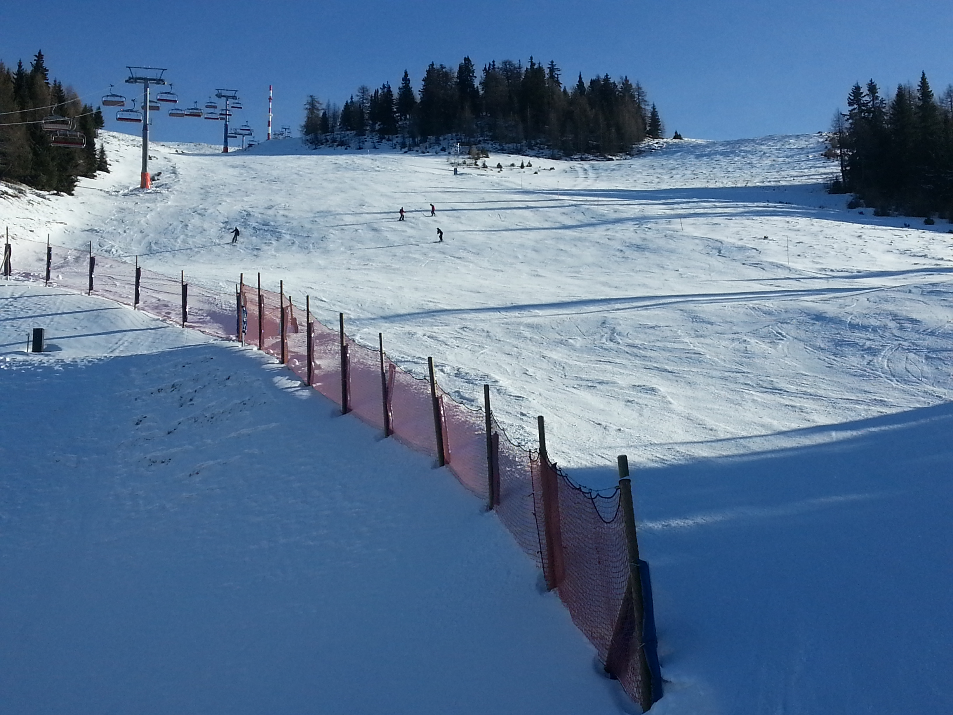 Rote Piste des Kärntener Sportberges Goldeck in Österreich